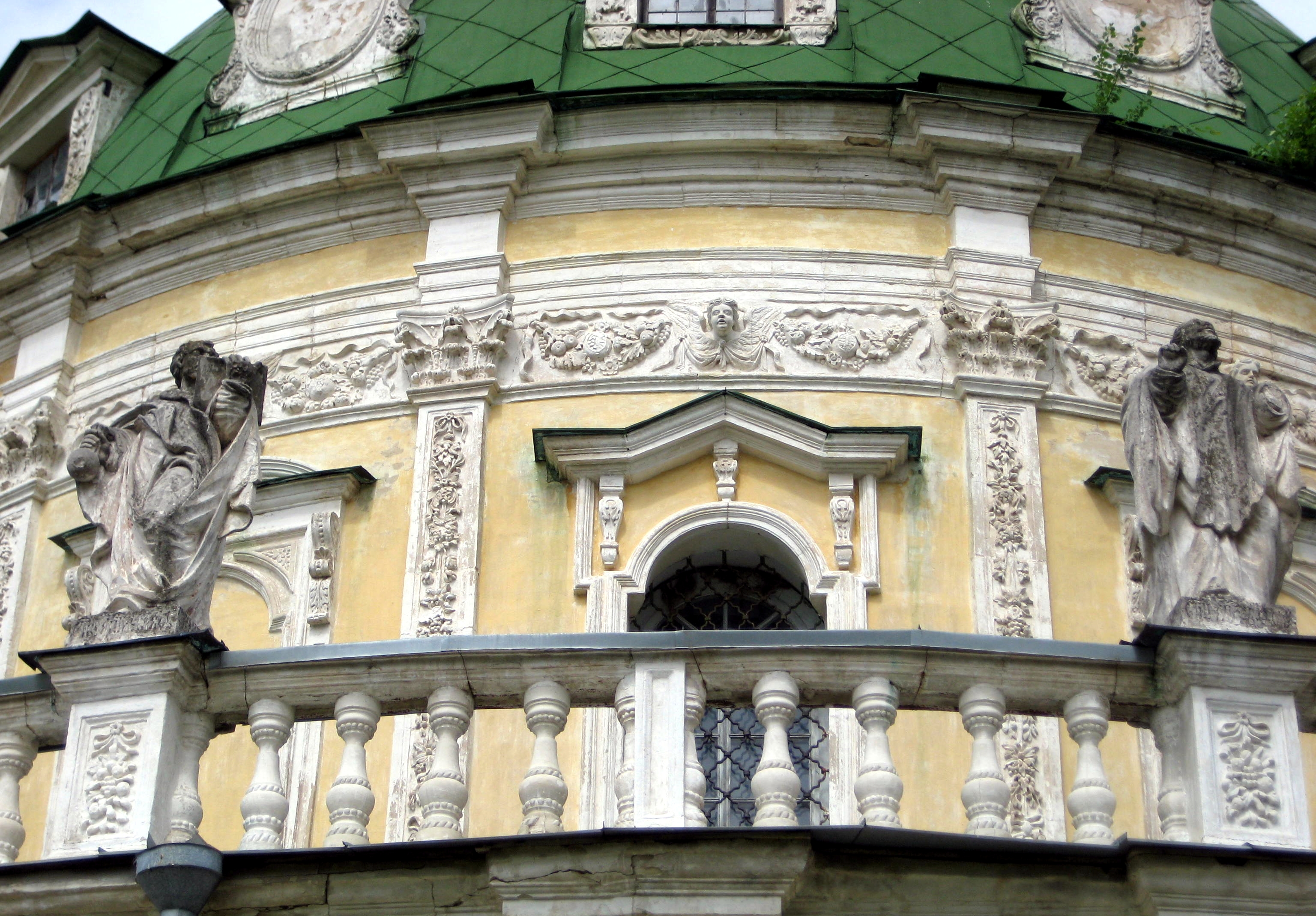 Церковь в Подмоклово